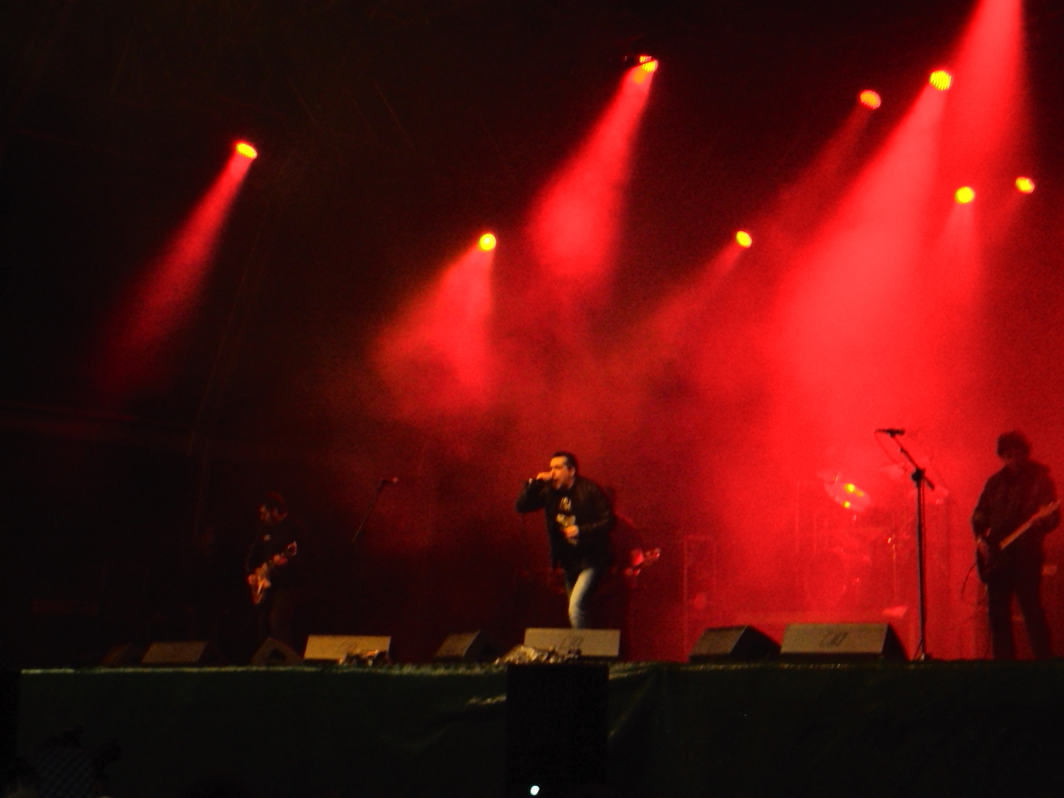 Foto realizada durante la actuación de "El último ke zierre" en el festival Viñarock celebrado en Villarobledo (Albacete) en 2012